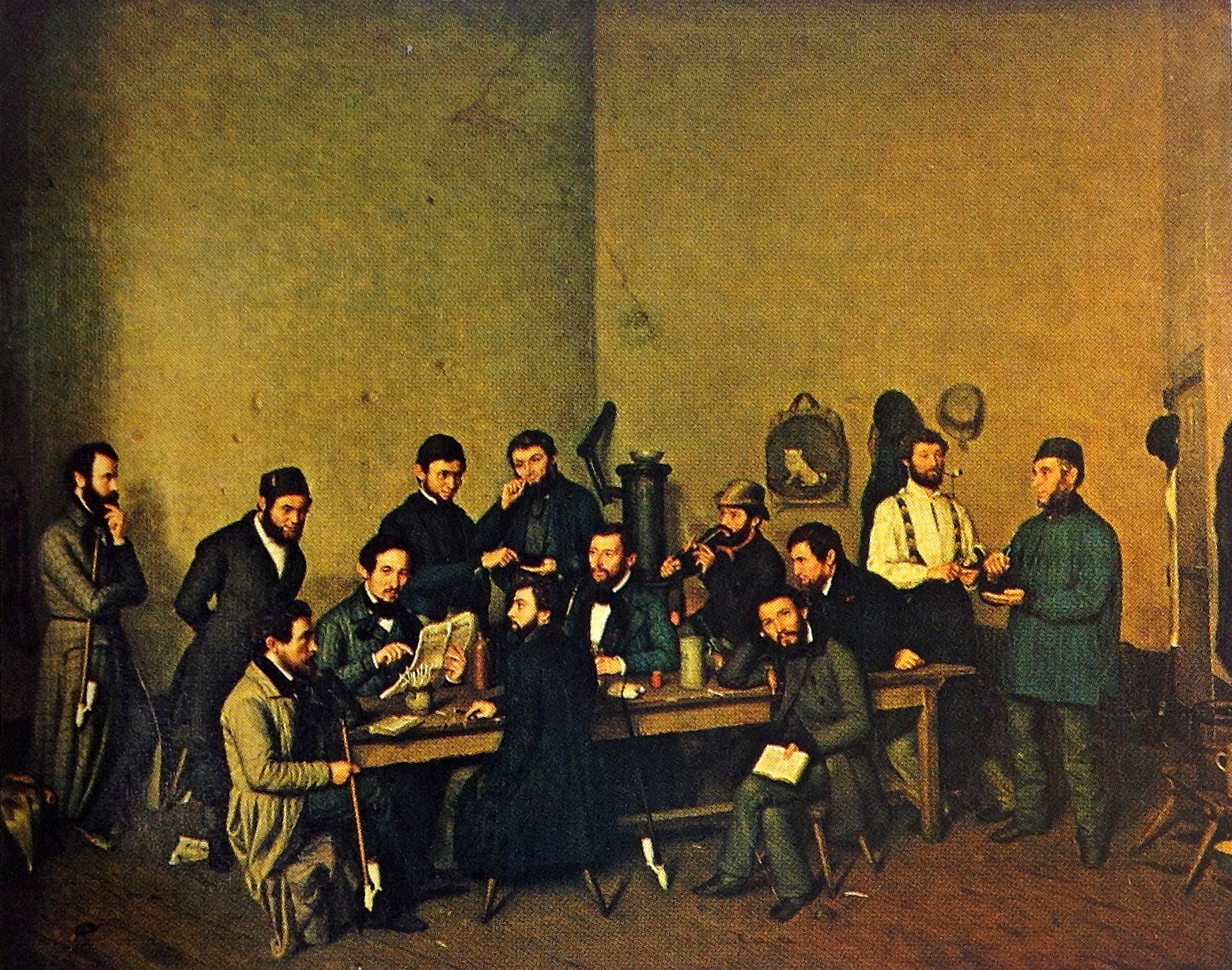 Gemälde, Johann Velten, 1848: Die 48er Revolutionäre nach ihrer Gefangennahme durch preußische Truppen.